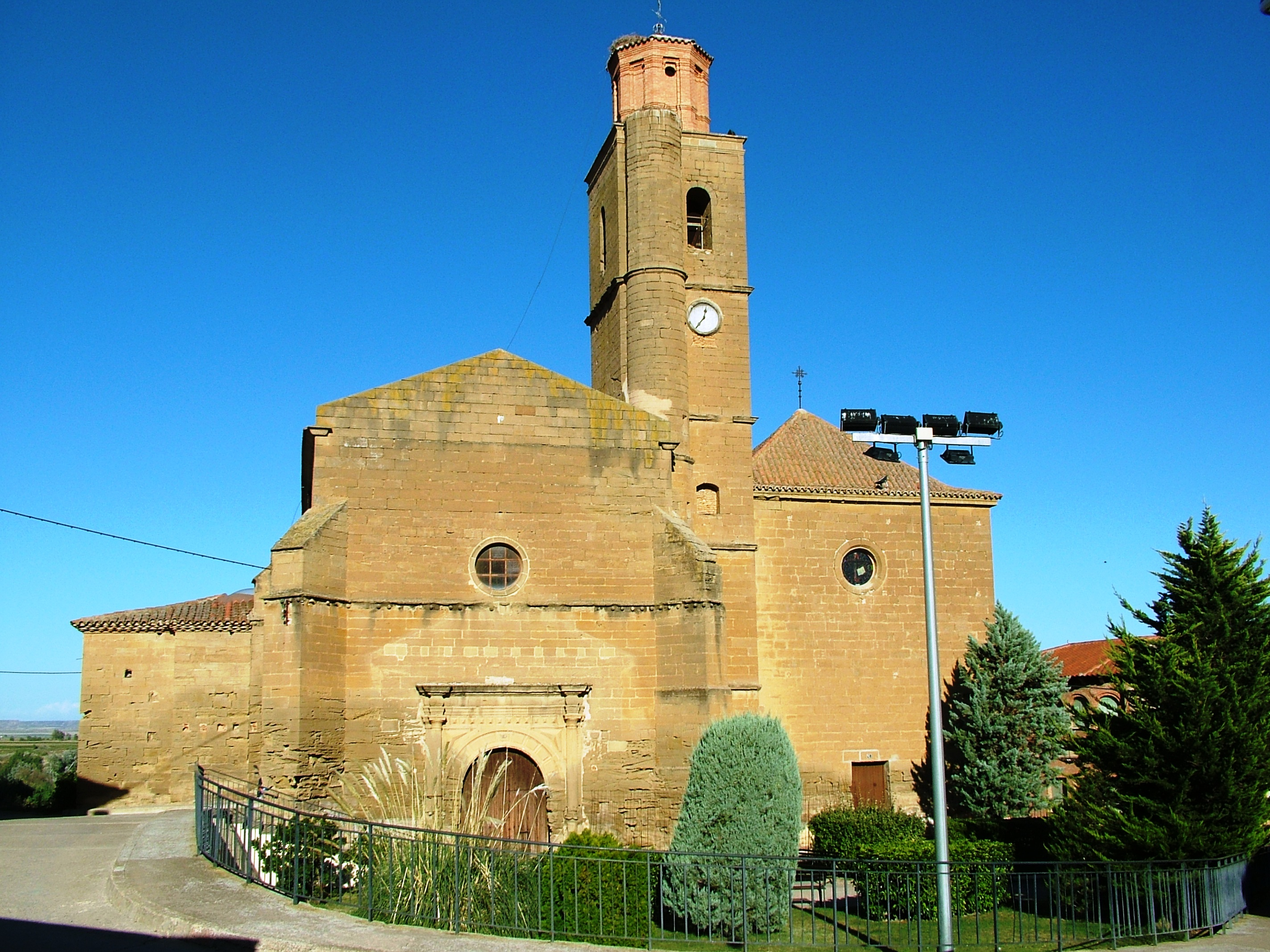 Iglesia de San Juan, Lalueza.